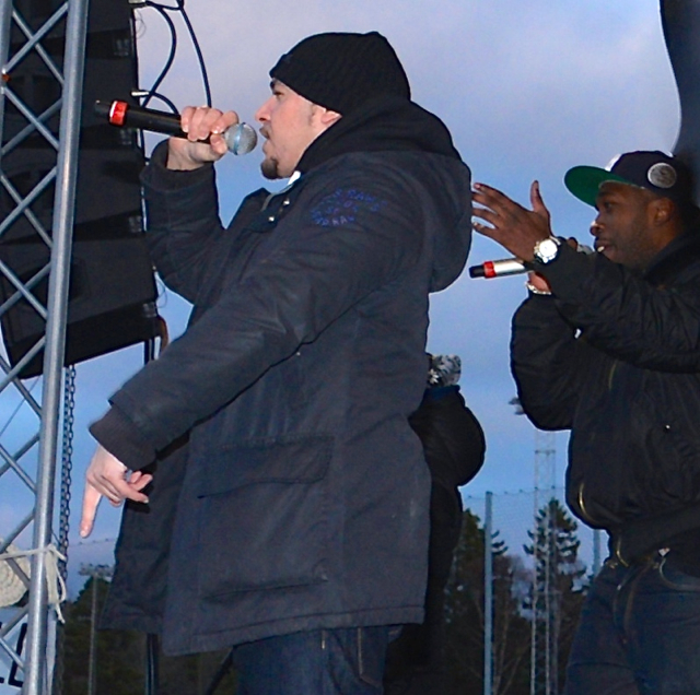 Ison & Fille i Antirasistdemonstrationen i Kärrtorp den 22 december 2013.